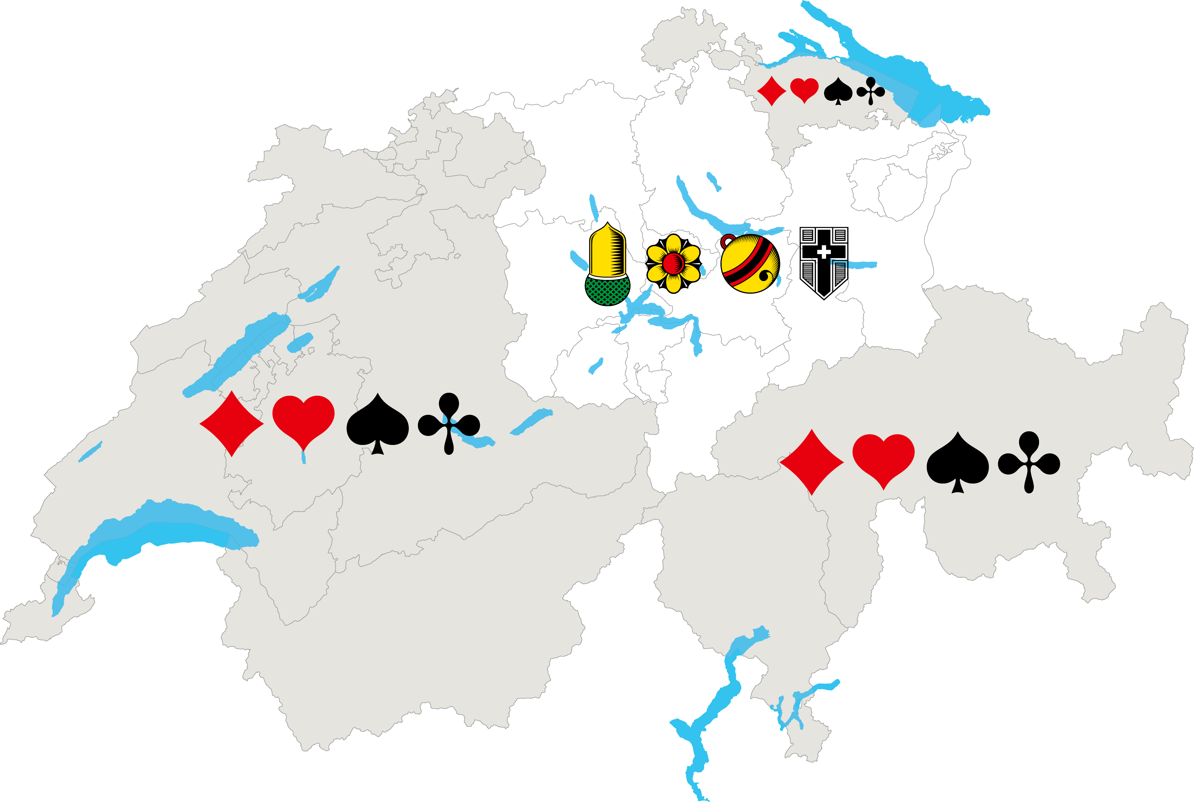 Die genaue Herkunft des schweizerischen Jassgrabens entlang der Aare und Reuss ist unklar. Die beiden Flüsse galten früher als natürliche Grenze, zusätzlich standen die Gebiete im Westen unter französischem Einfluss, im Osten unter deutschem.